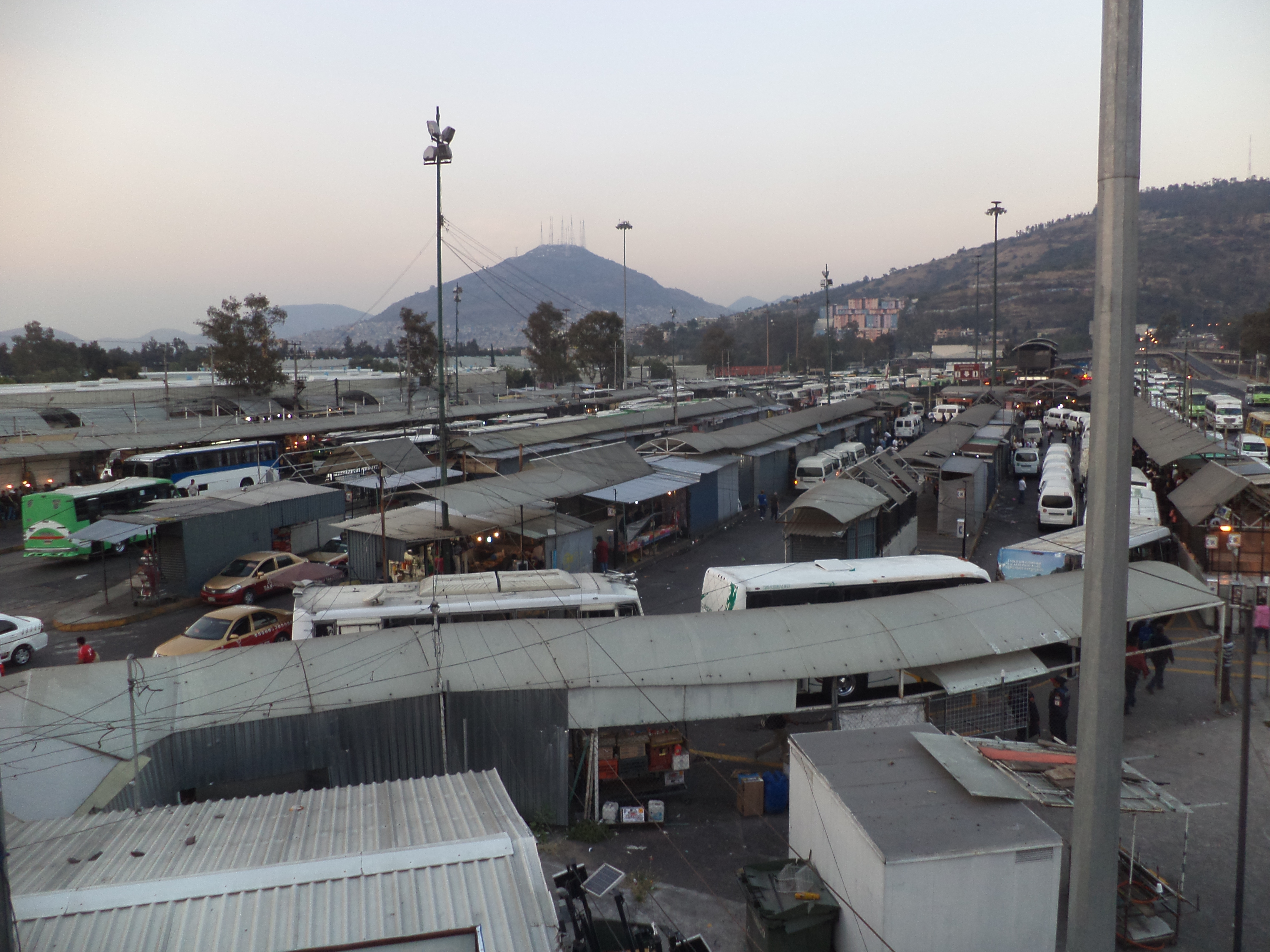 CETRAM Indios Verdes